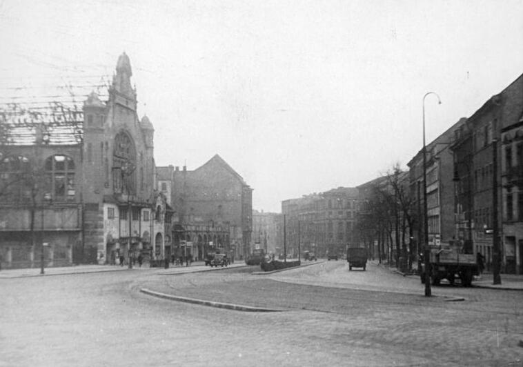 Berlin, Schönhauser Allee, Ruinen der Brauerei Königsstadt (keine Kirche!) Zentralbild B. 20.1.51 Senefelderplatz in Berlin. Berlin 20.1.1951 Blick vom Senefelder Platz in die Schönhauser Allee in Richtung Schönhauser Tor